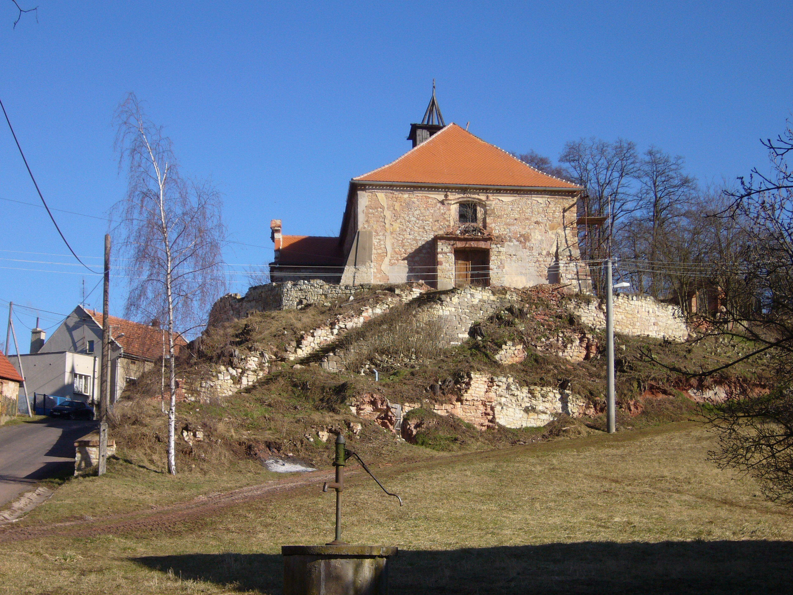 Kostel sv. Bartoloměje (Nečemice), Nečemice